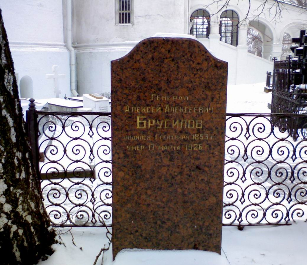 Памятник генералу А. А. Брусилову в Новодевичьем монастыре